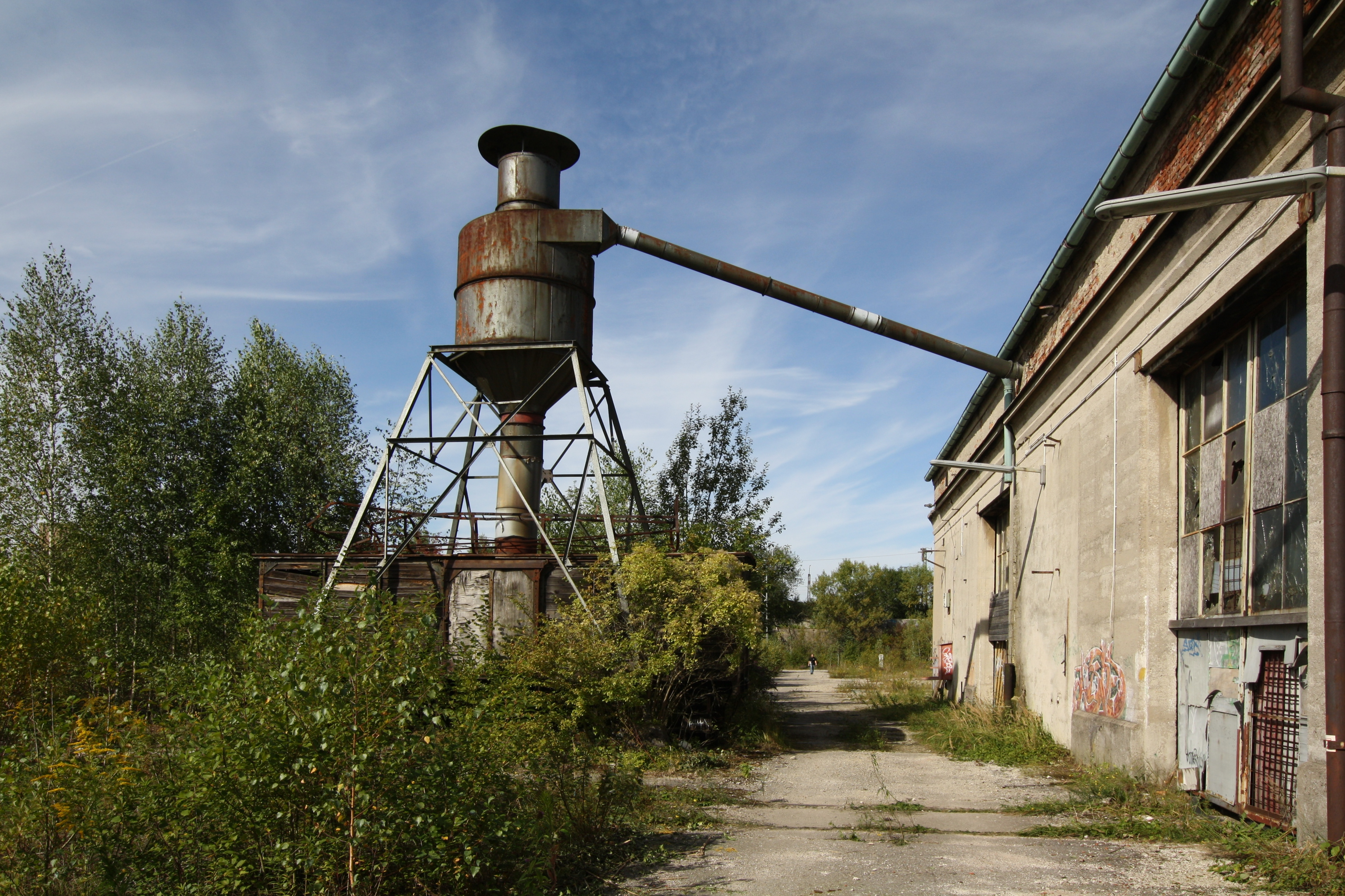 ehemaliges Betriebswerk München 4, Berg am Laim